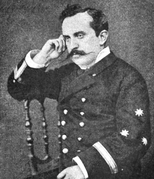 Castor Elices Rodríguez (1847-1886)